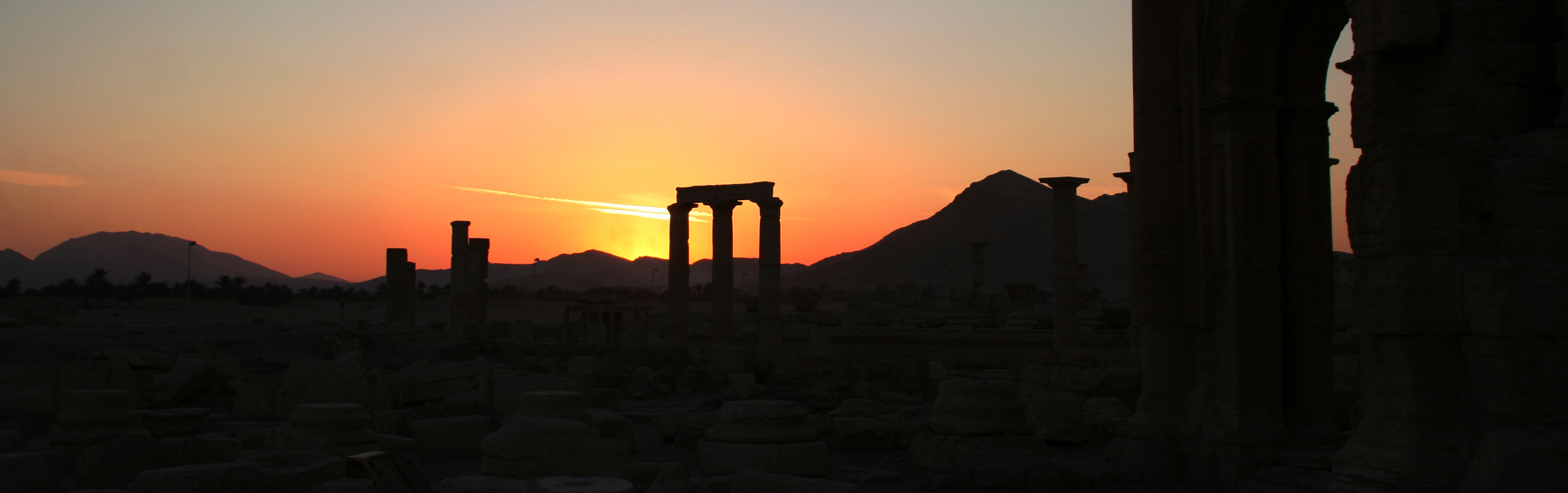 Puesta de sol en las ruinas de Palmira, Siria.